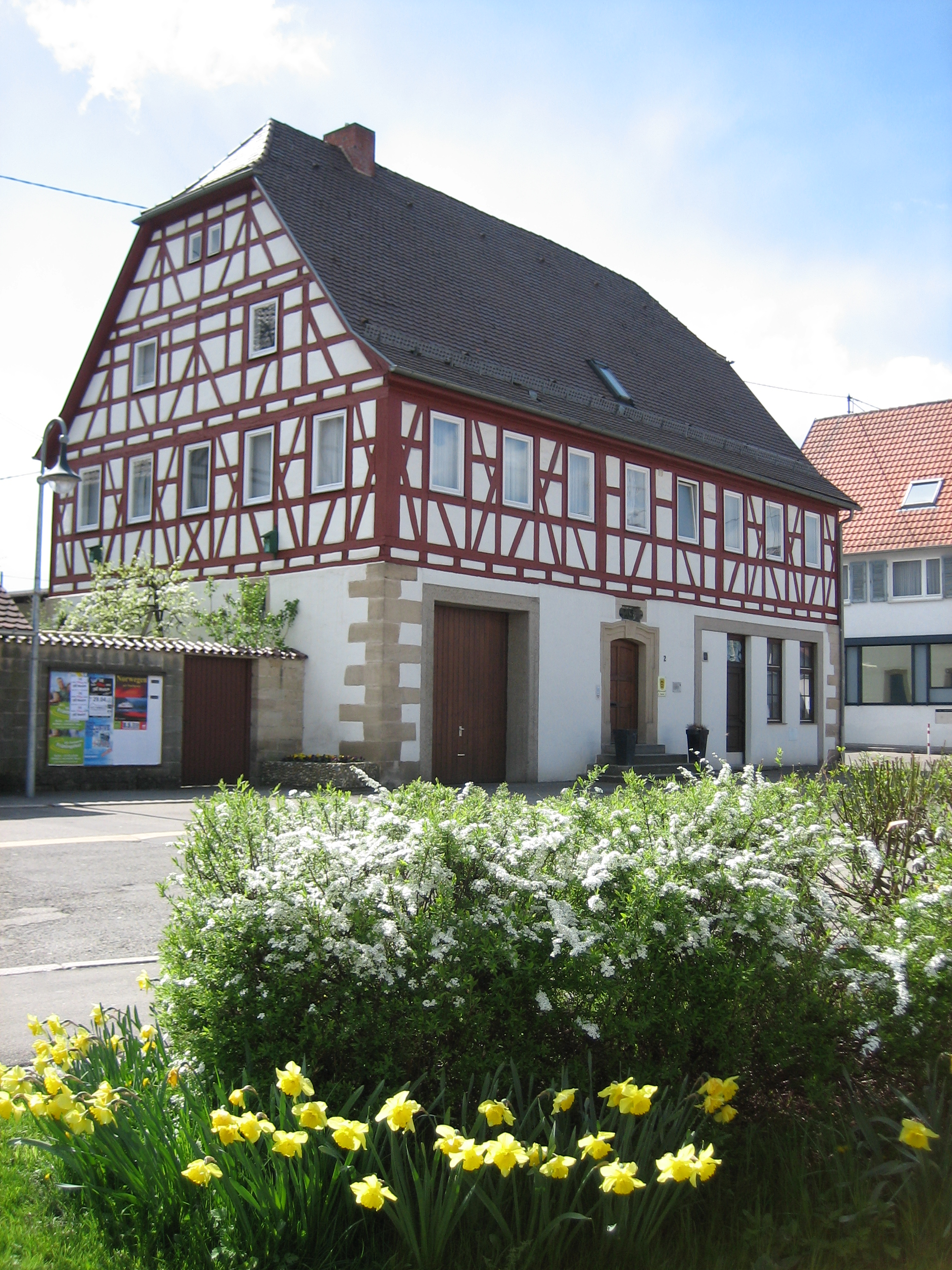 Walddorfhäslach, Fachwerkhaus 1780 Forsthaus Notariat